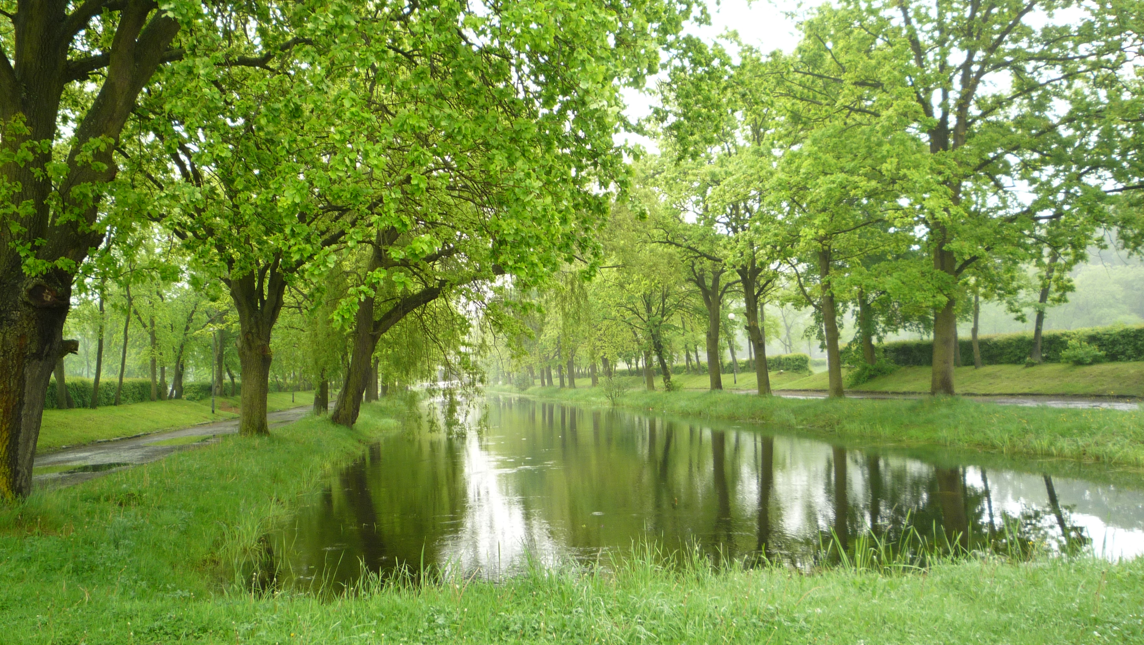 Staw na terenie Słubickiego Ośrodka Sportu i Rekreacji w Słubicach.